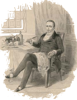 Portrait de Brillat-Savarin